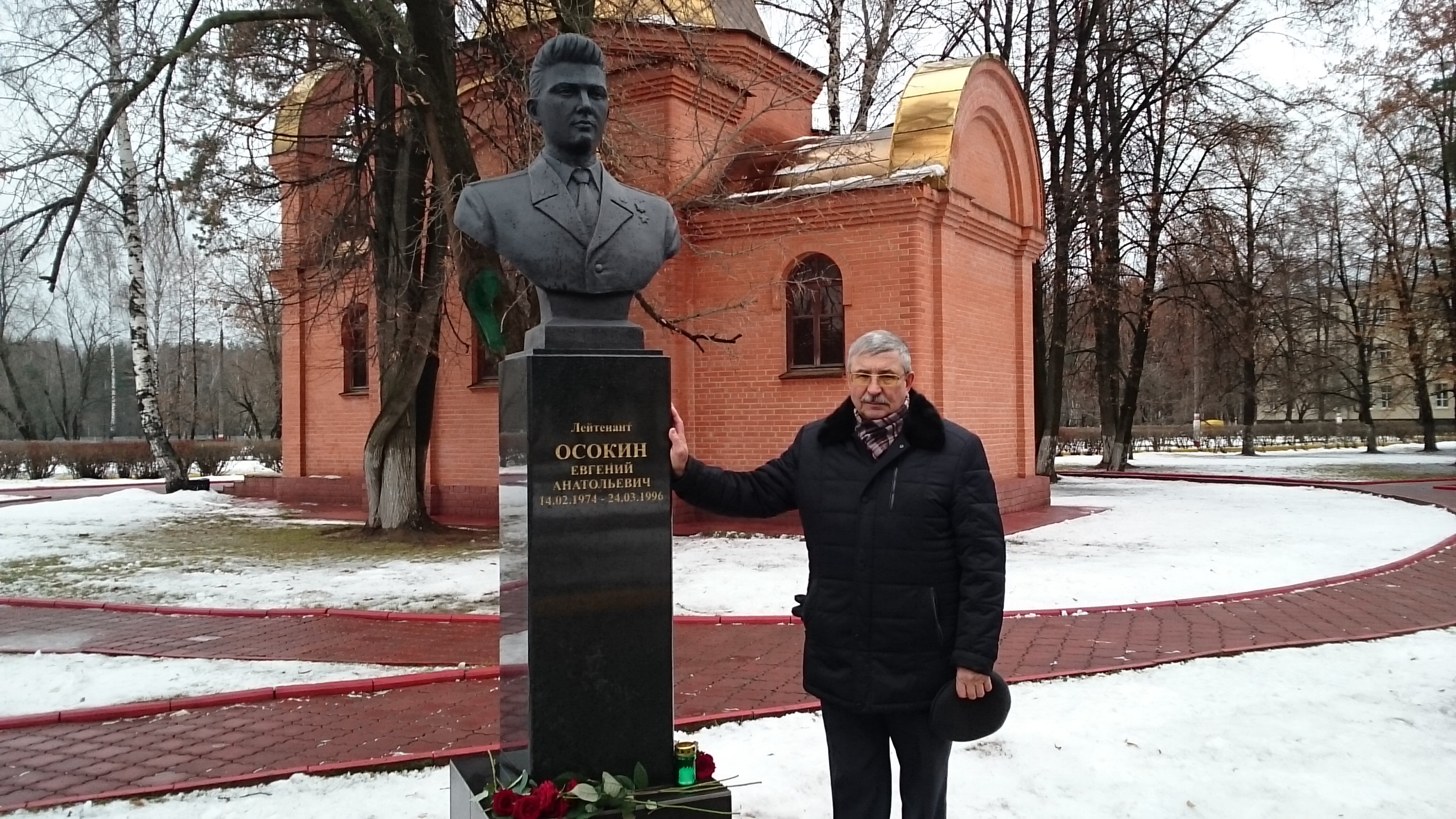 На Аллее Героев МосВОКУ у бюста лейтенанта Осокина Е. А. отец Анатолий Осокин